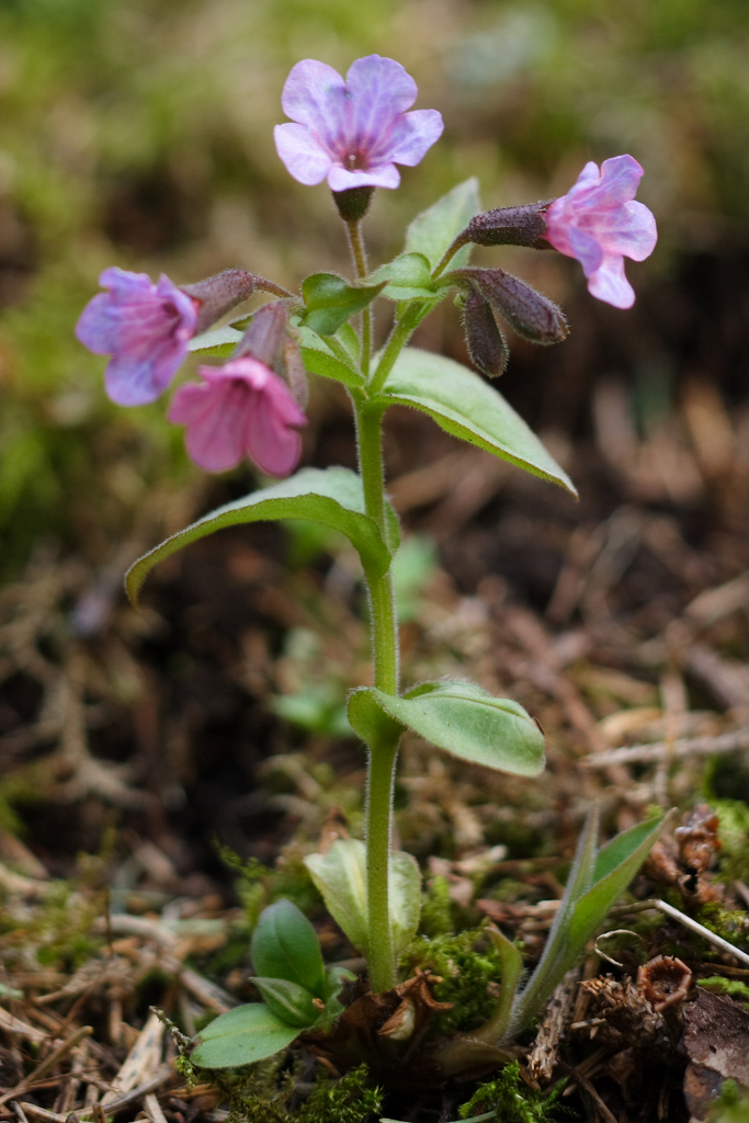 Suffolk Lungwort (Pulmonaria obscura)